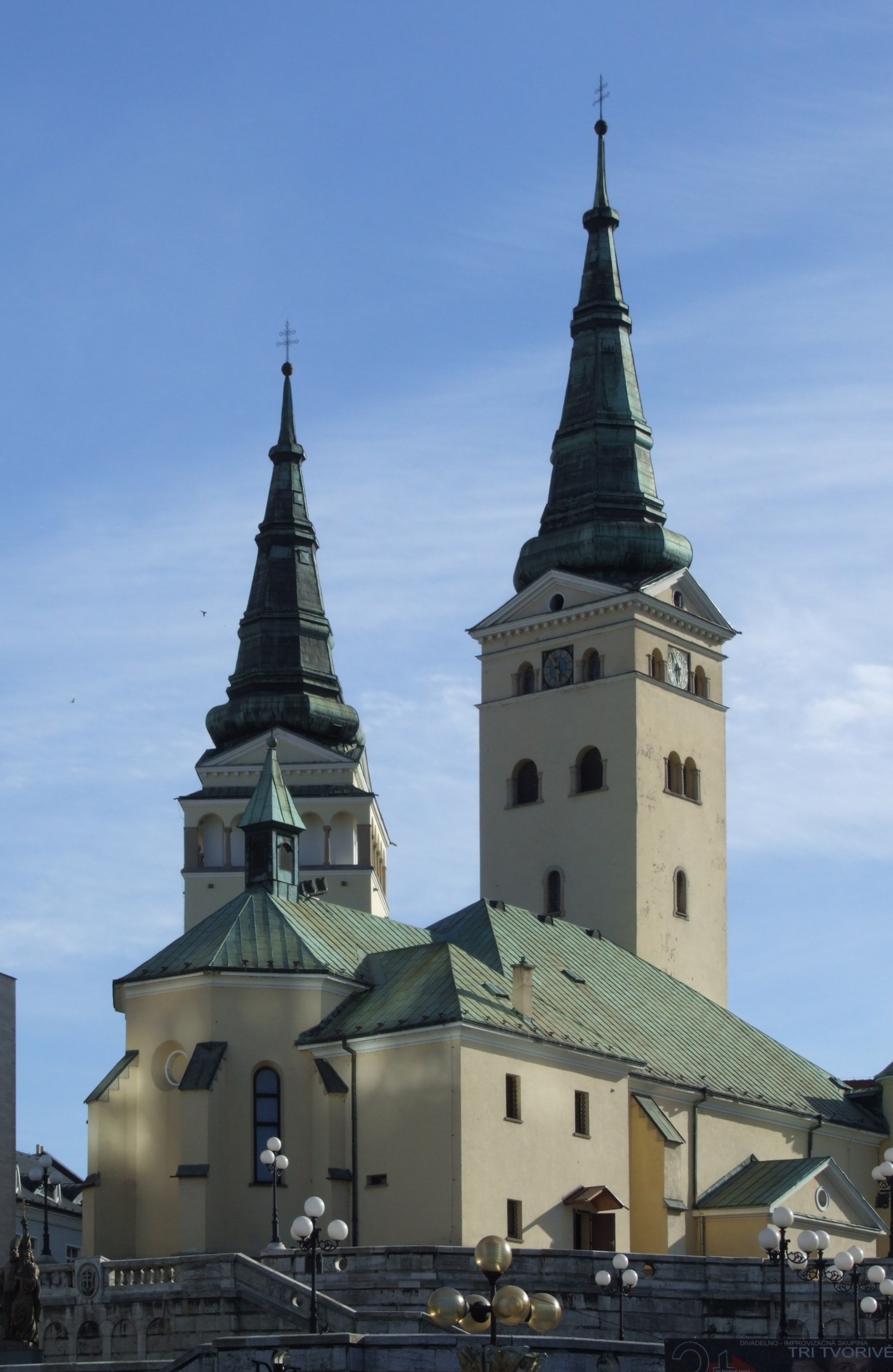 Žilina - kostol Najsvätejšej Trojice a Burianova veža